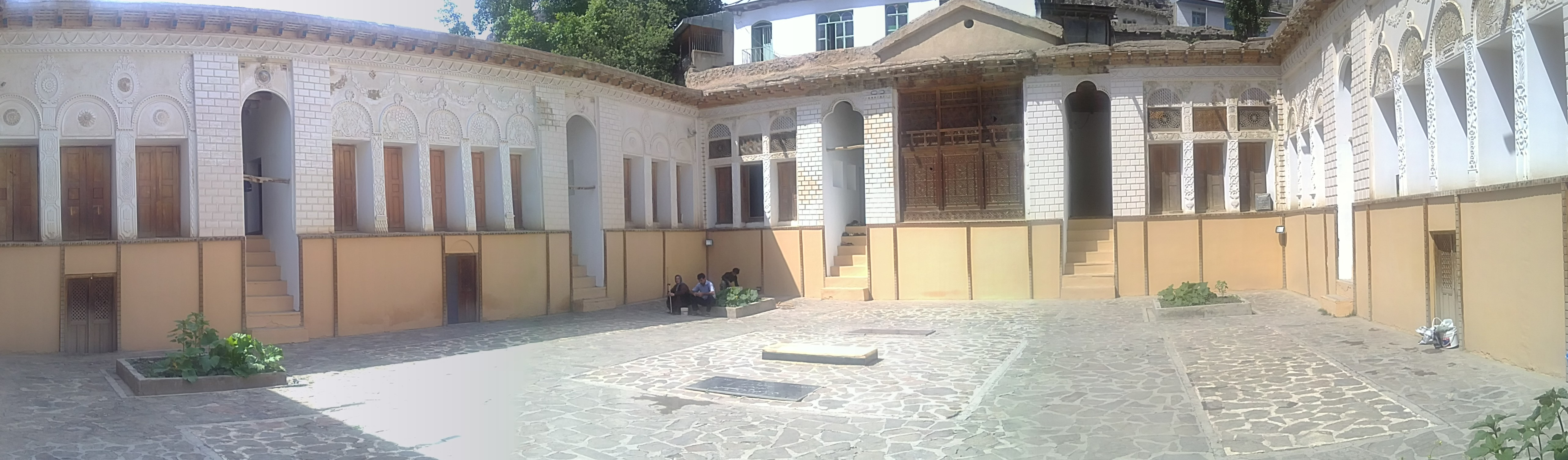 خانه نیما یوشیج